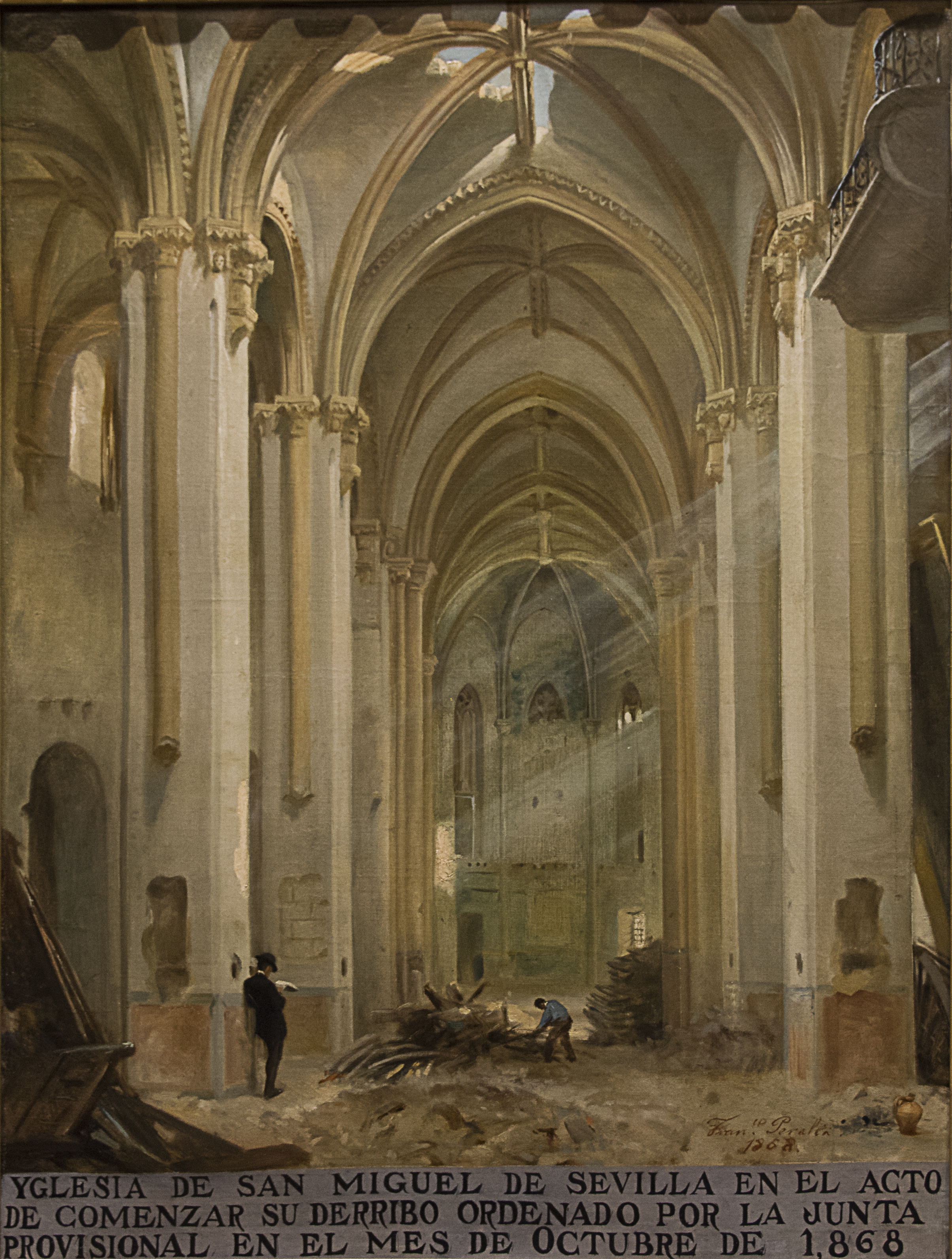 Cuadro:Derribo de la parroqua de san Miguel. Obra de Francisco Peralta (1868). Óleo sobre lienzo. Colección particular.